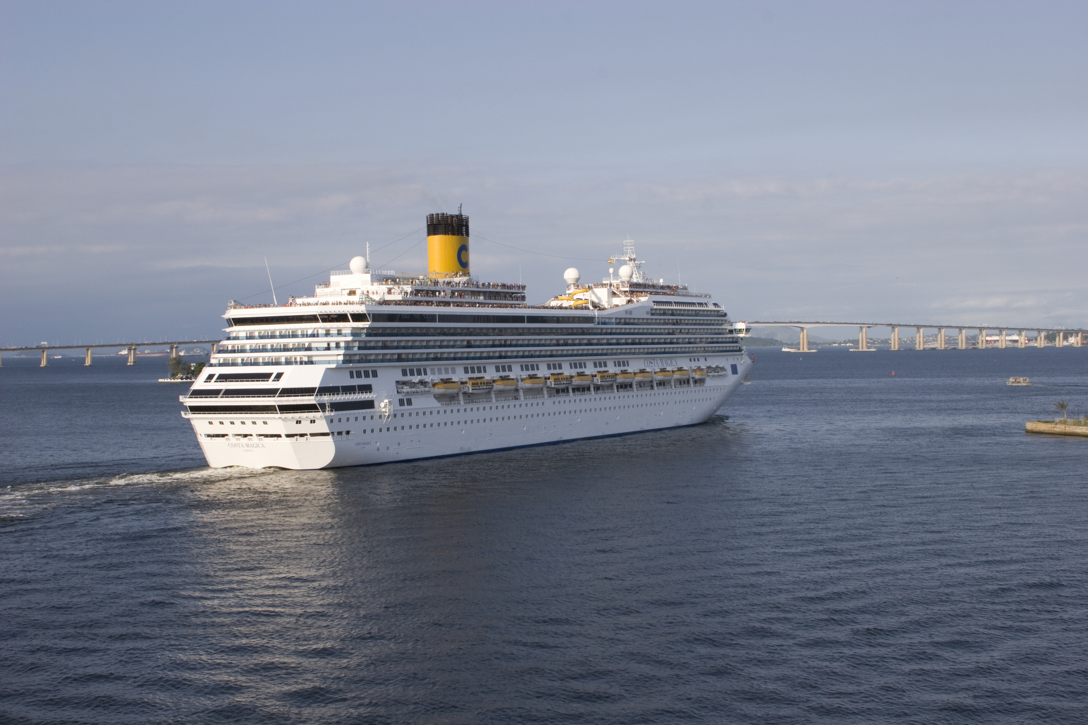 Costa Magica cruise ship